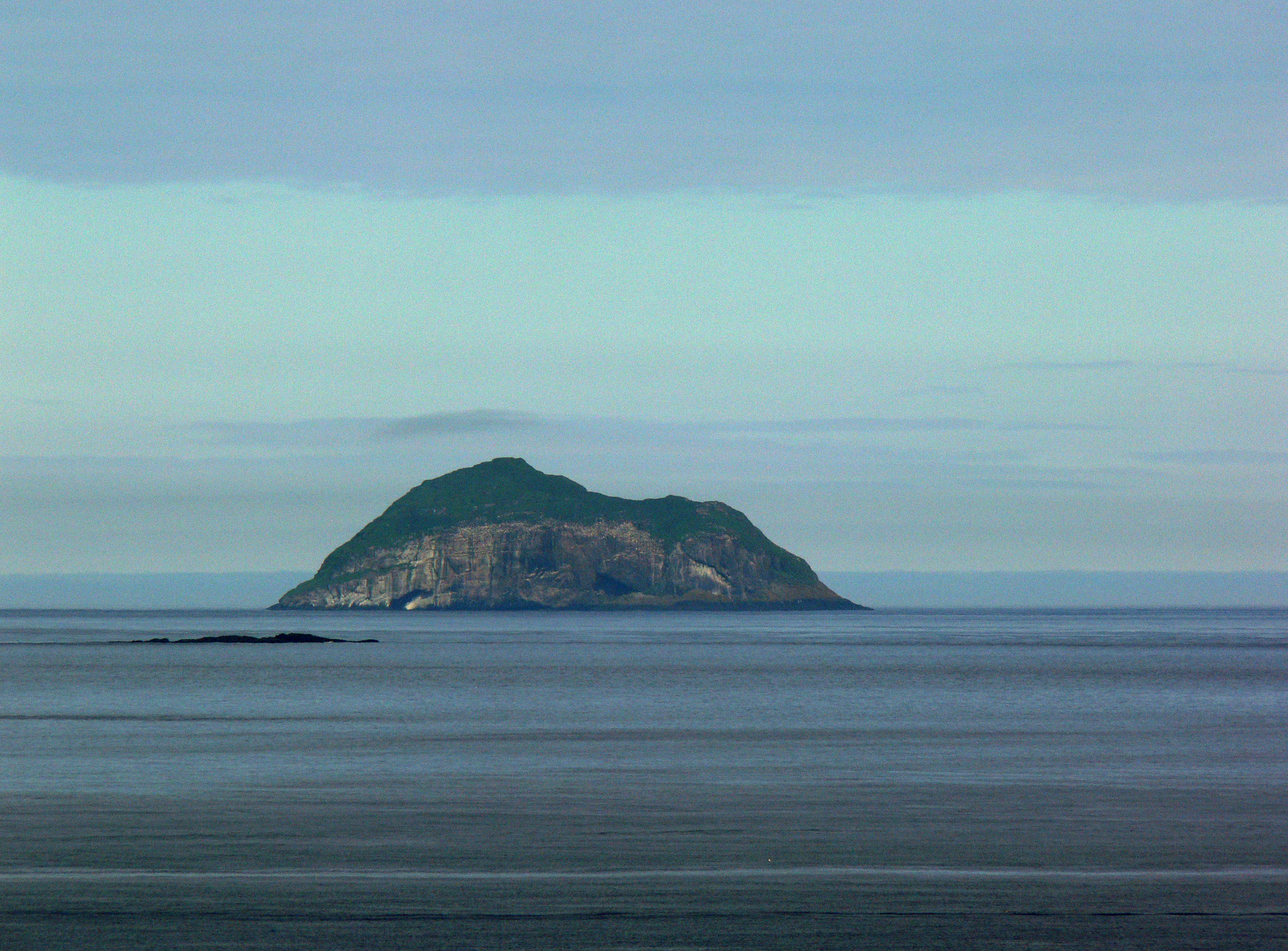 Insel Skrúður zwischen Fáskrúðsfjörður und Reiðarfjörður